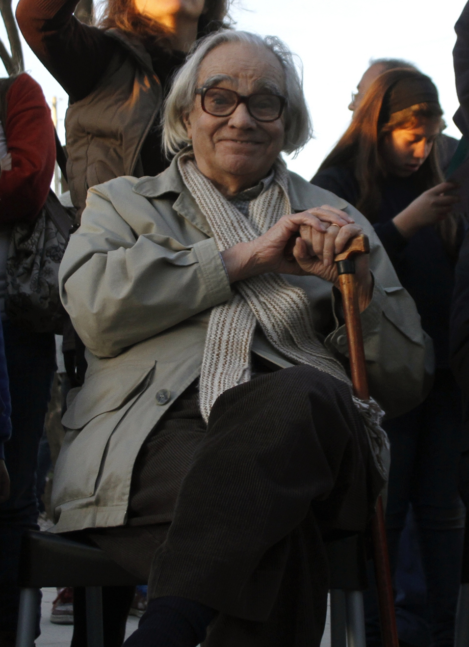 24 de Julio de 2011. El artista plástico Leon Ferrari visitó Tecnópolis para presenciar un espectáculo musical realizado con su obra instalada en el predio. Fotos: Mariano Sandá/Tecnópolis